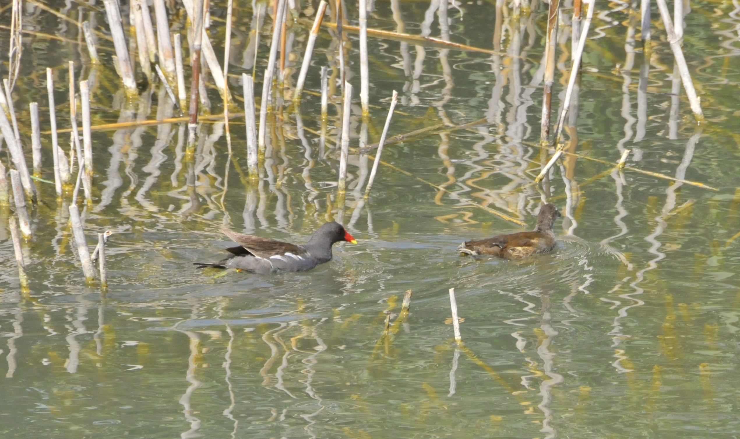 Moraira, Teichralle in der Marjal del Senillar